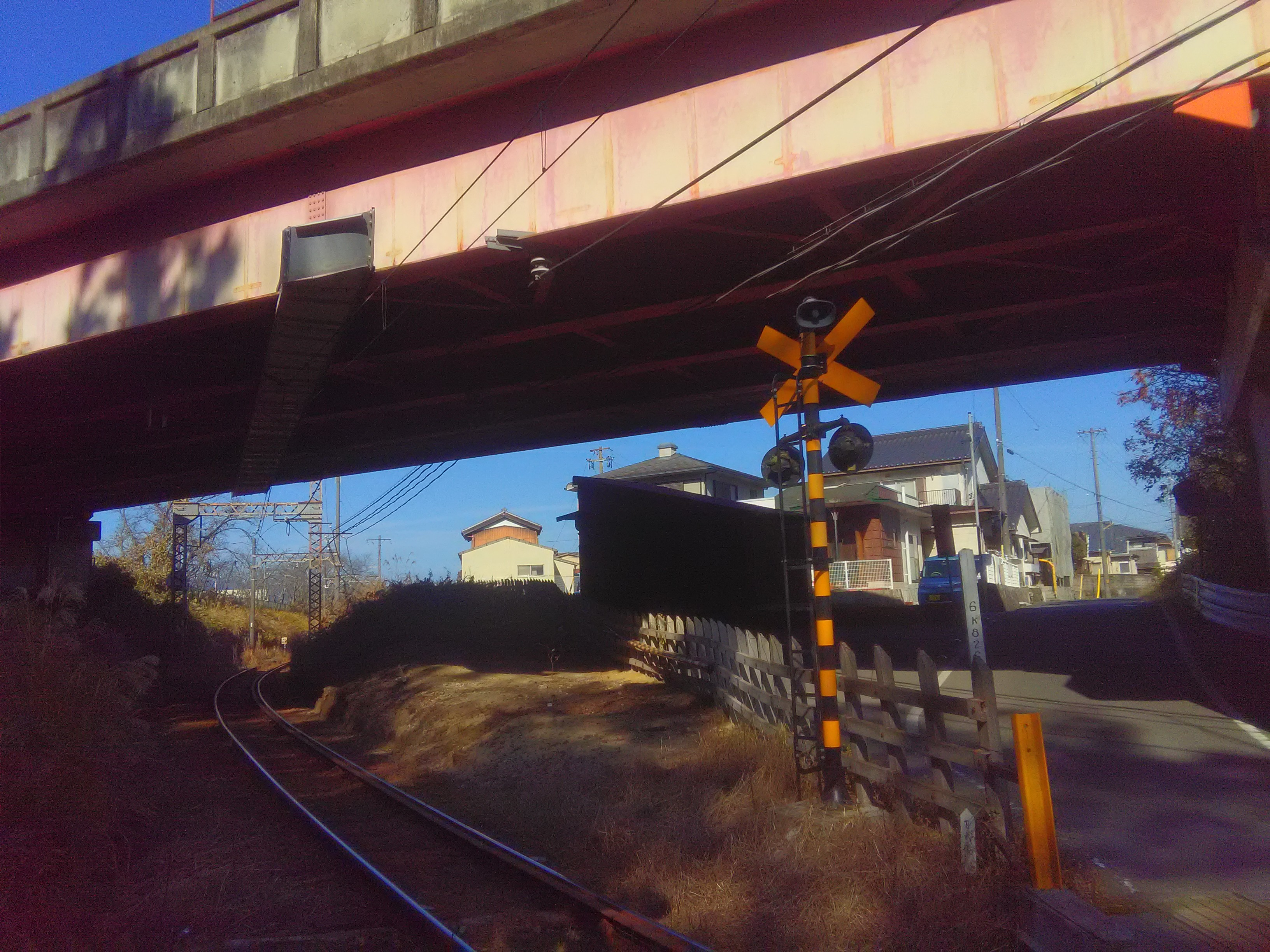 奥は旧・四十九駅跡。手前は桑町3号踏切。上は国道422号の四十九跨線橋。